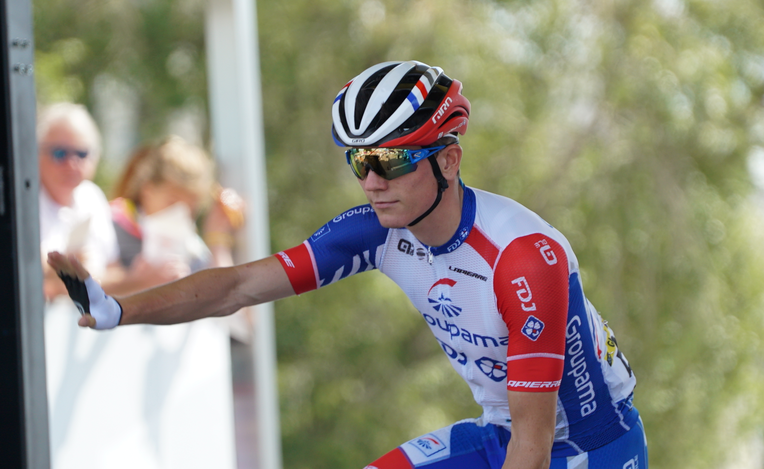 signature lors du départ à Reims.